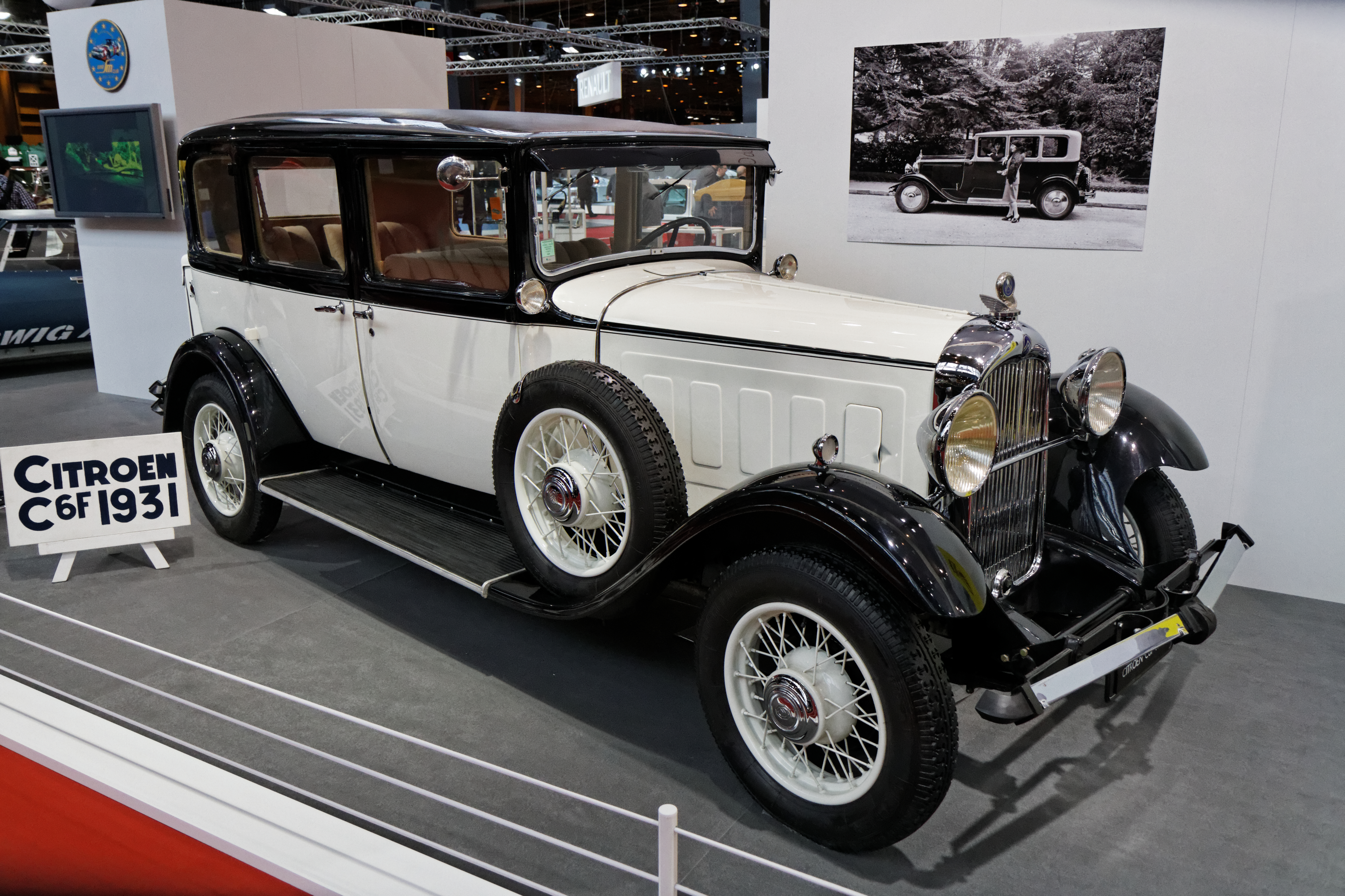 Une Citroën C6 F présentée lors du salon Retromobile 2014.